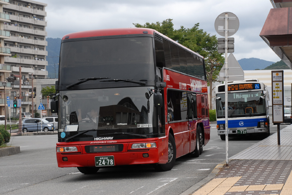 山口駅前にて撮影